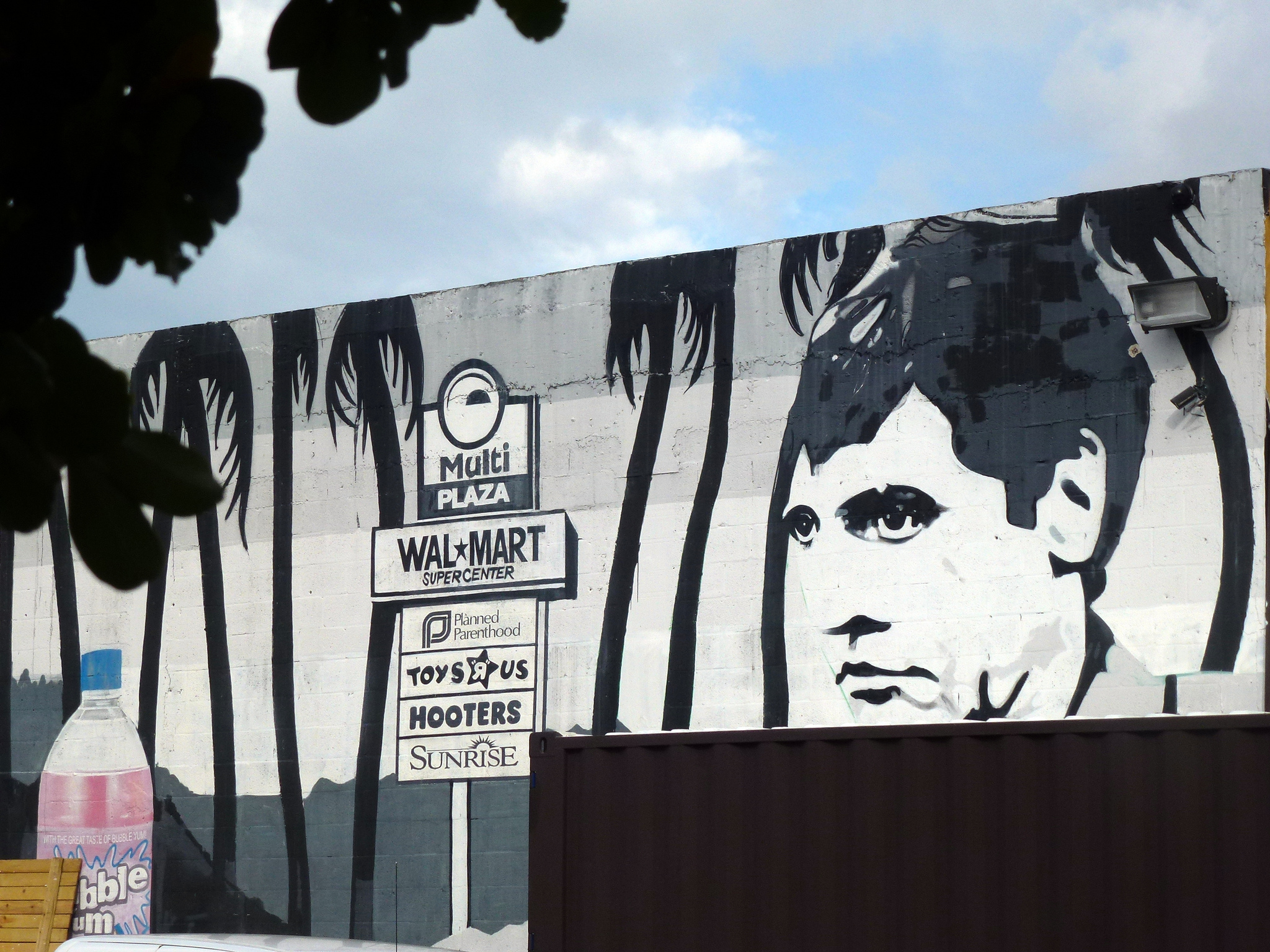 Тони Монтана - главный персонаж фильма "Лицо со шрамом" - граффити